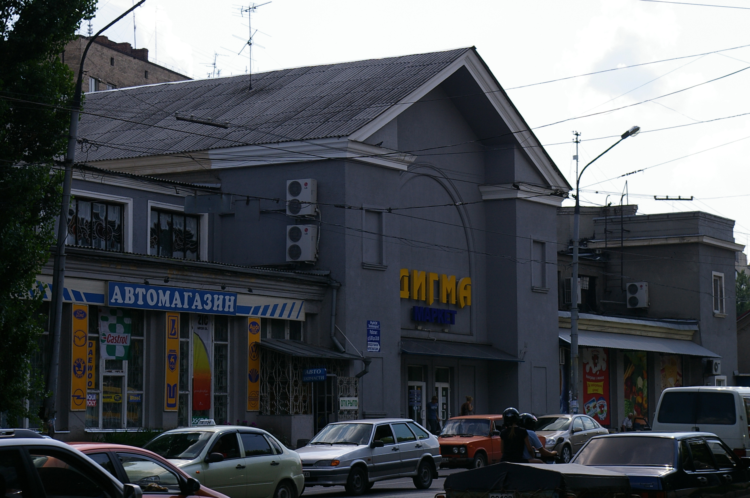 Харьков, на Полтавской дороге